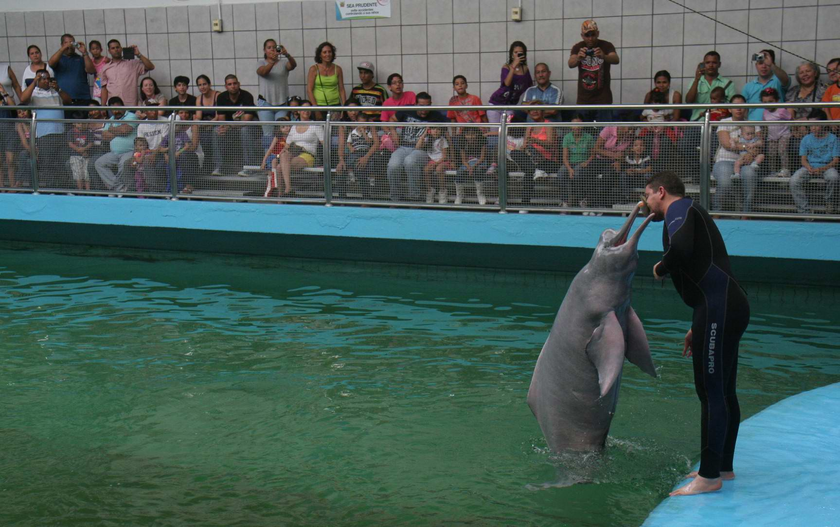 El delfín del Amazonas o del Orinoco, Inia geoffrensis (también llamado delfín rosado, tonina, boto o bufeo) es el delfín de agua dulce más grande que existe y vive en las aguas pantanosas y rápidas del Orinoco, en sus ambarinos afluentes y en las aguas claras de los ríos Negro y Ventuari. Se las puede encontrar en toda la cuenca del Orinoco y Amazonas, llegando a Colombia, Brasil, Guyana, Bolivia y Perú. La variedad que se encuentra en nuestro Orinoco se denomina Inia geofrensis humboldtianay se considera una especie en estado vulnerable de conservación. El Acuario de Valencia es el unico en el mundo que entrena Toninas actualmente cuenta con dos toninas Zeus y Dalila.